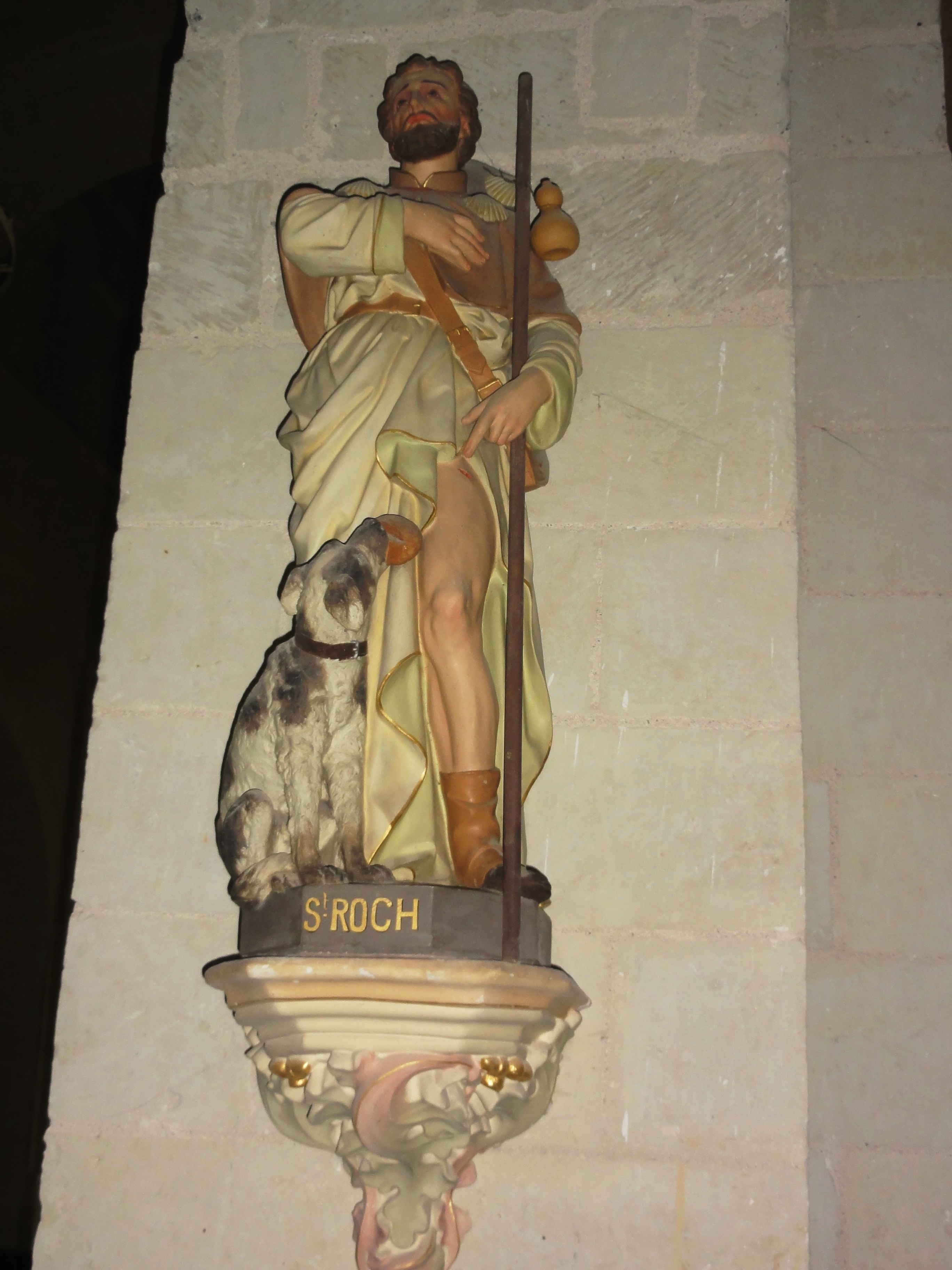 Ingrandes-sur-Vienne (Vienne) église, statue Saint Roch